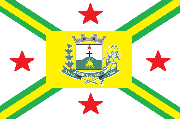 Bandeira de Estrela do Indaiá, Minas Gerais, Brasil